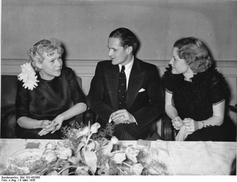 ADN/ZB/Archiv Im faschistischen Deutschland 1938 Kameradschaftsabend anläßlich der Tagung der Reichsfilmkammer in der Kameradschaft der Deutschen Künstler in Berlin am 4. März 1938; v.l. Fita Benkhoff, der Reichsfilmdramaturg Ewald von Demandowsky und Hilde Krüger. 3006-38 [Scherl Bilderdienst]